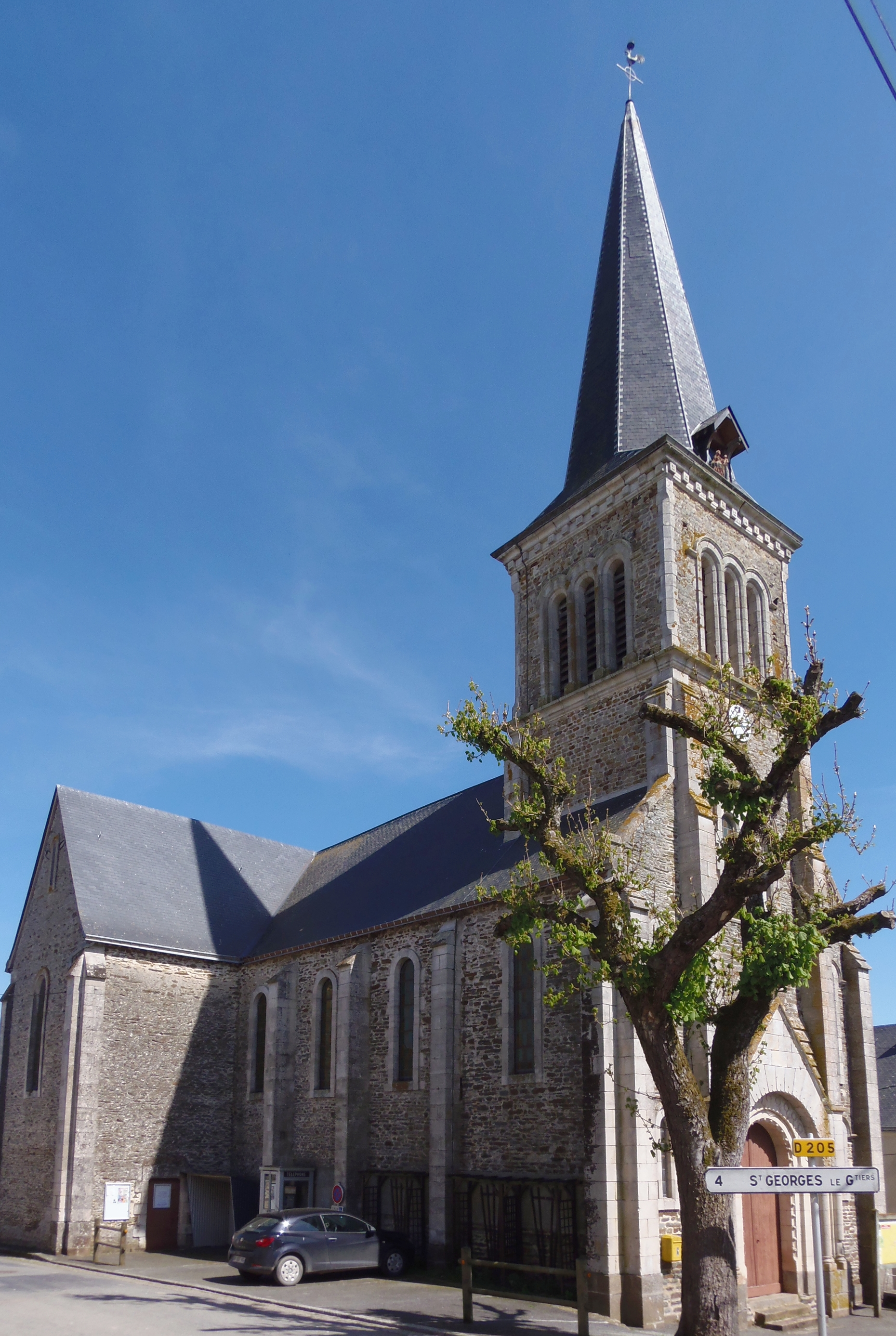 Saint-Mars-du-Désert (Pays de la Loire, France). L'église Saint-Médard.